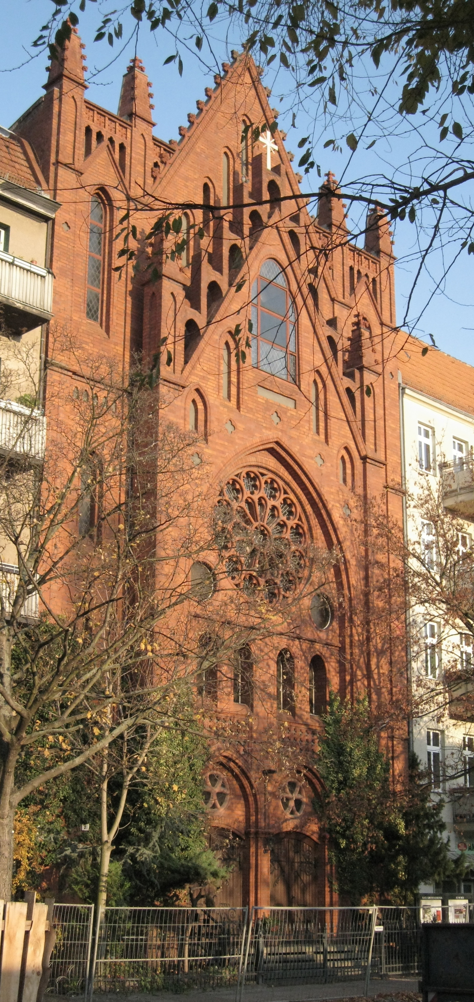 Fassade der St.-Petrus-Kirche